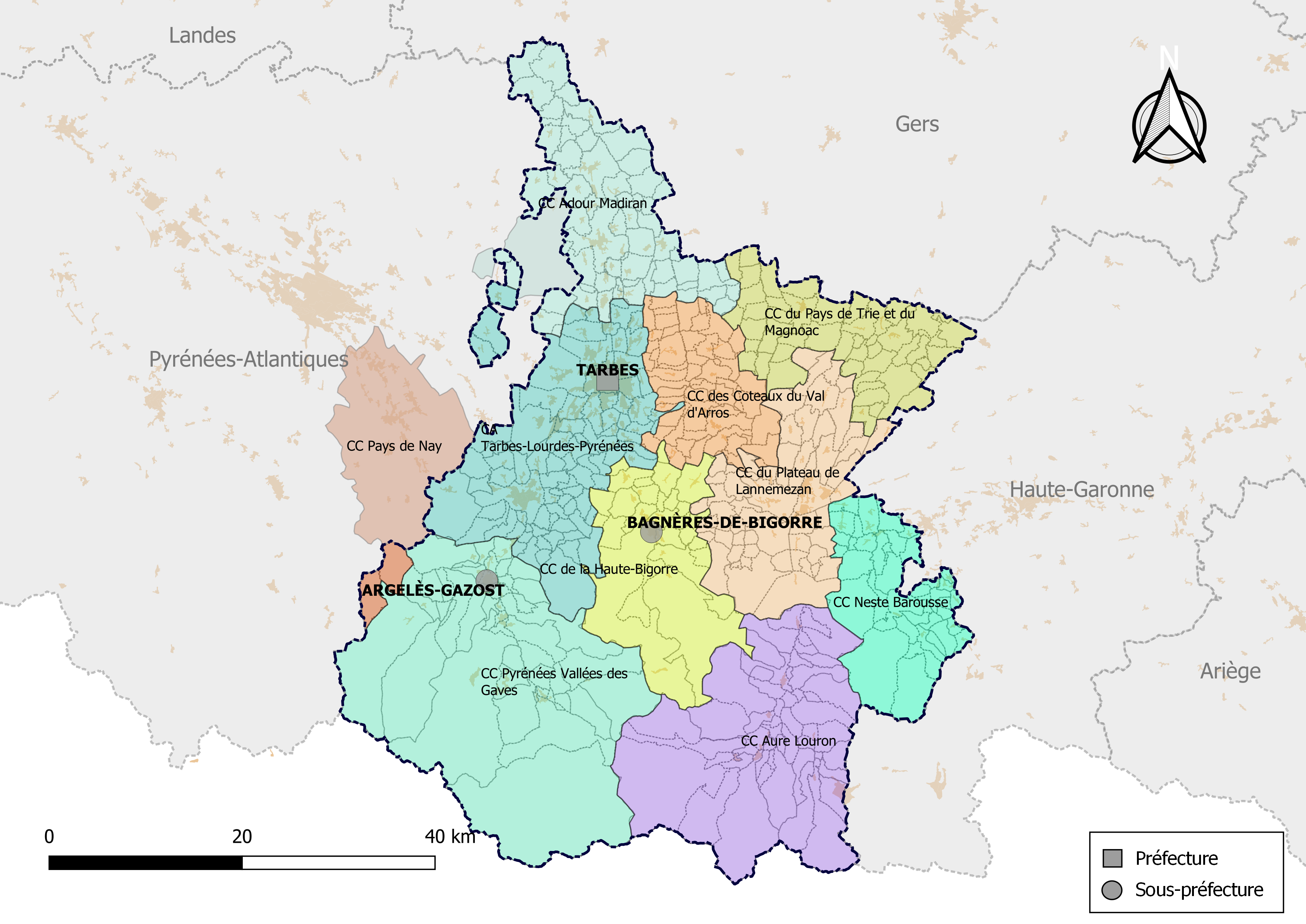 Carte des intercommunalités du département des Hautes-Pyrénées, France. Composition au 1er janvier 2019.